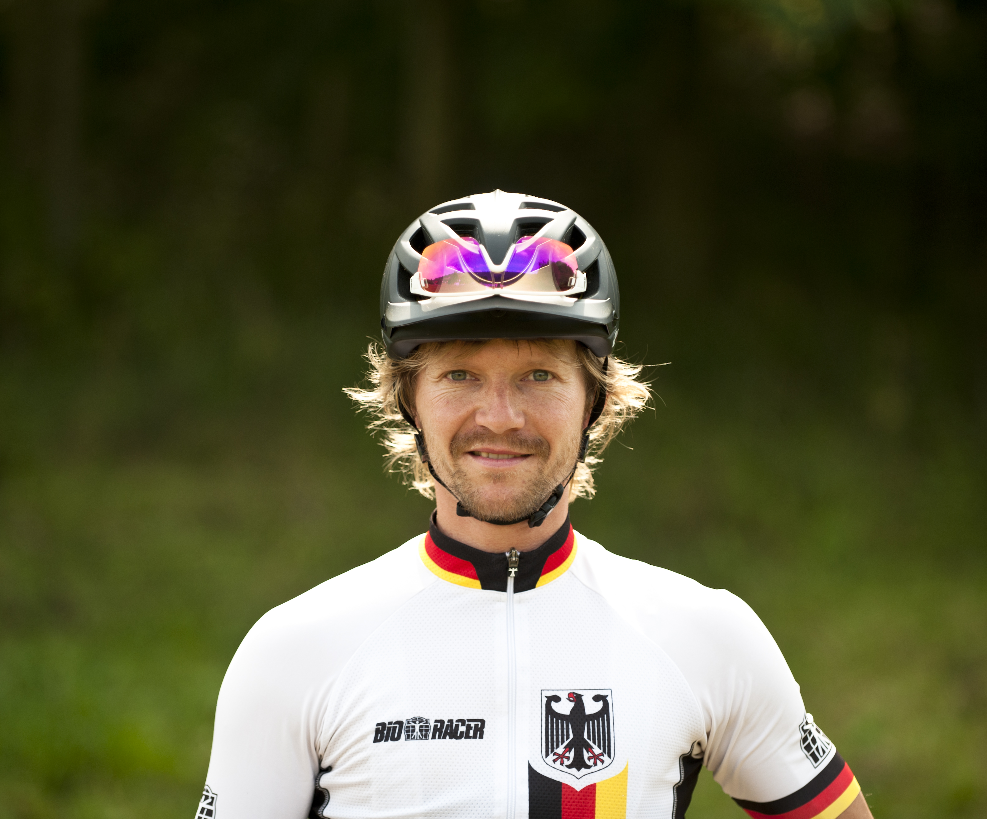 René Schmidt, als BDR Fahrtechniktrainer im Dress der deutschen Nationalmanschaft